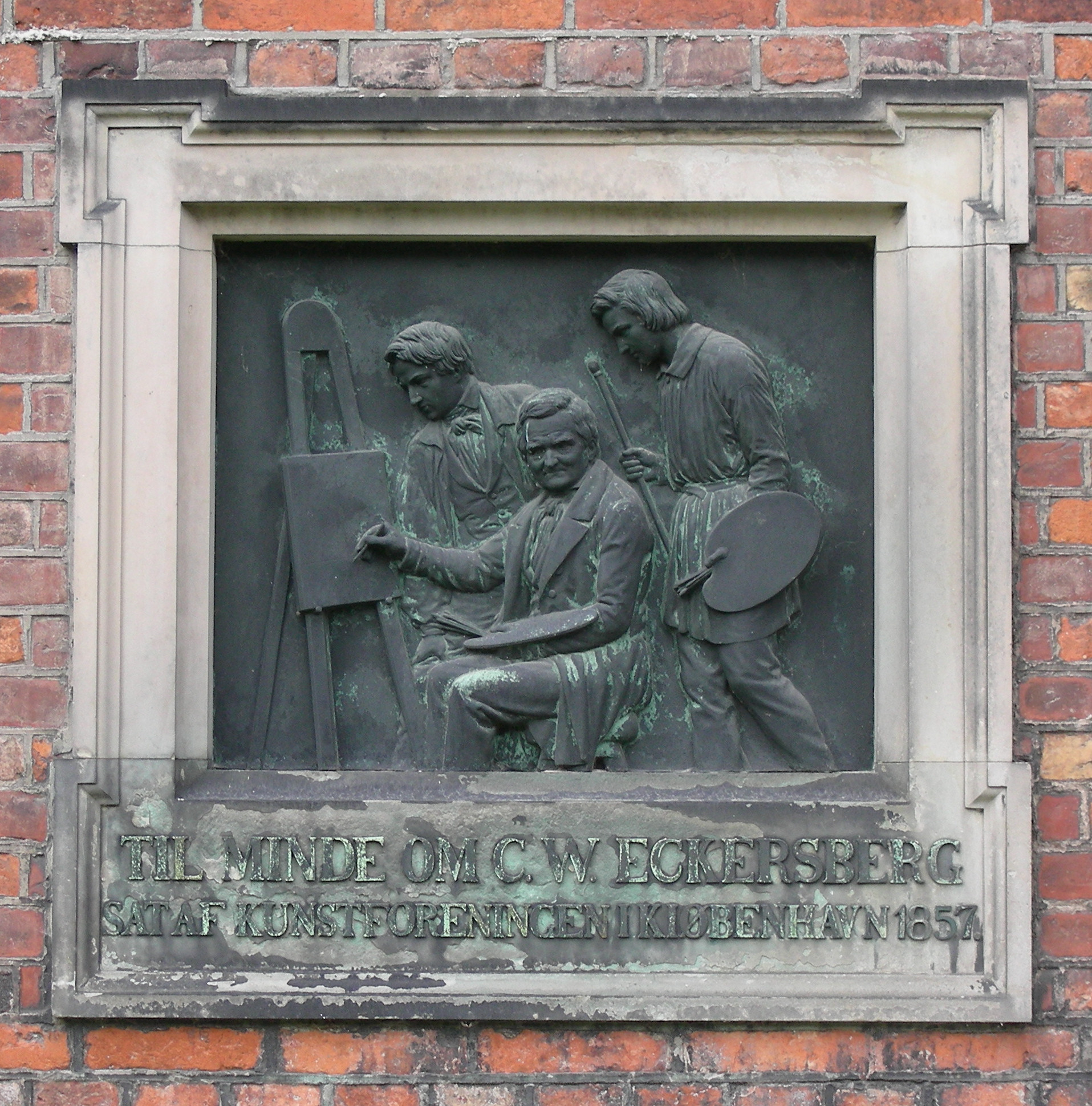 Garnisons Kirke (Garrison Church), Copenhagen, Denmark. Epitaph for C.W.Eckersberg.